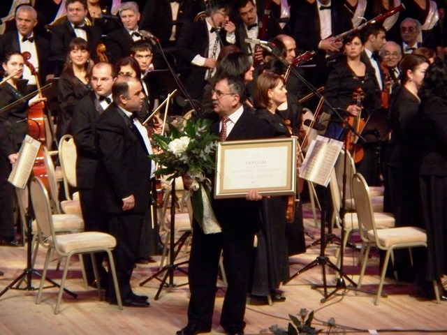 награждение лауреатов фестиваля Мугама